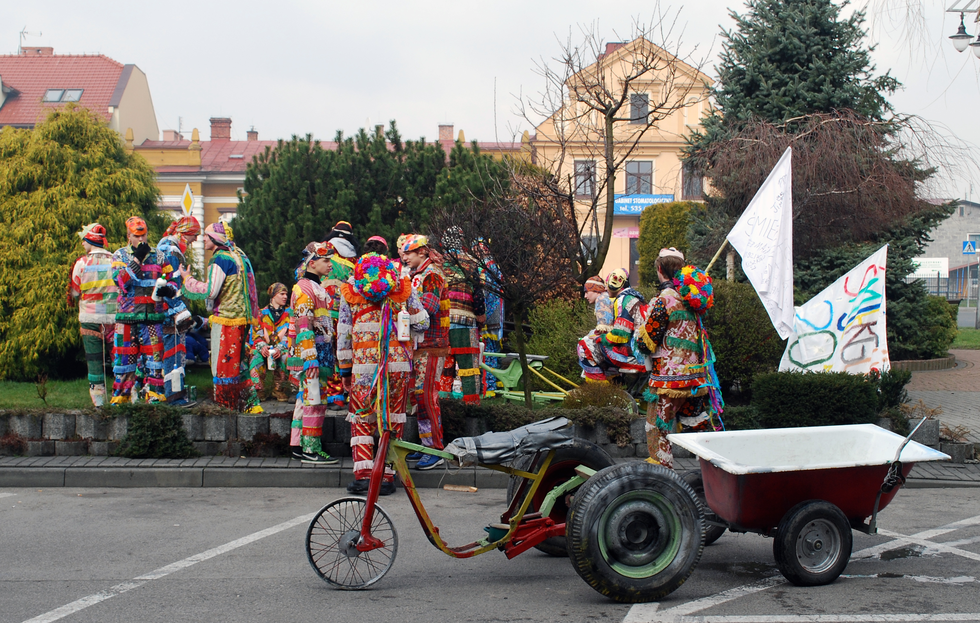 Śmierguśnicy na rynku w lany poniedziałek - narada